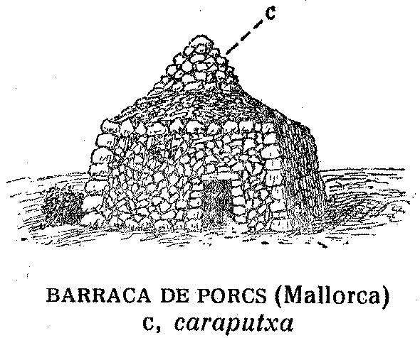 Construcció de pedra seca